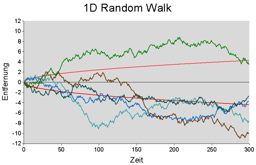 1D Random walk mit 100 Schritten der Schrittlänge 0,5.